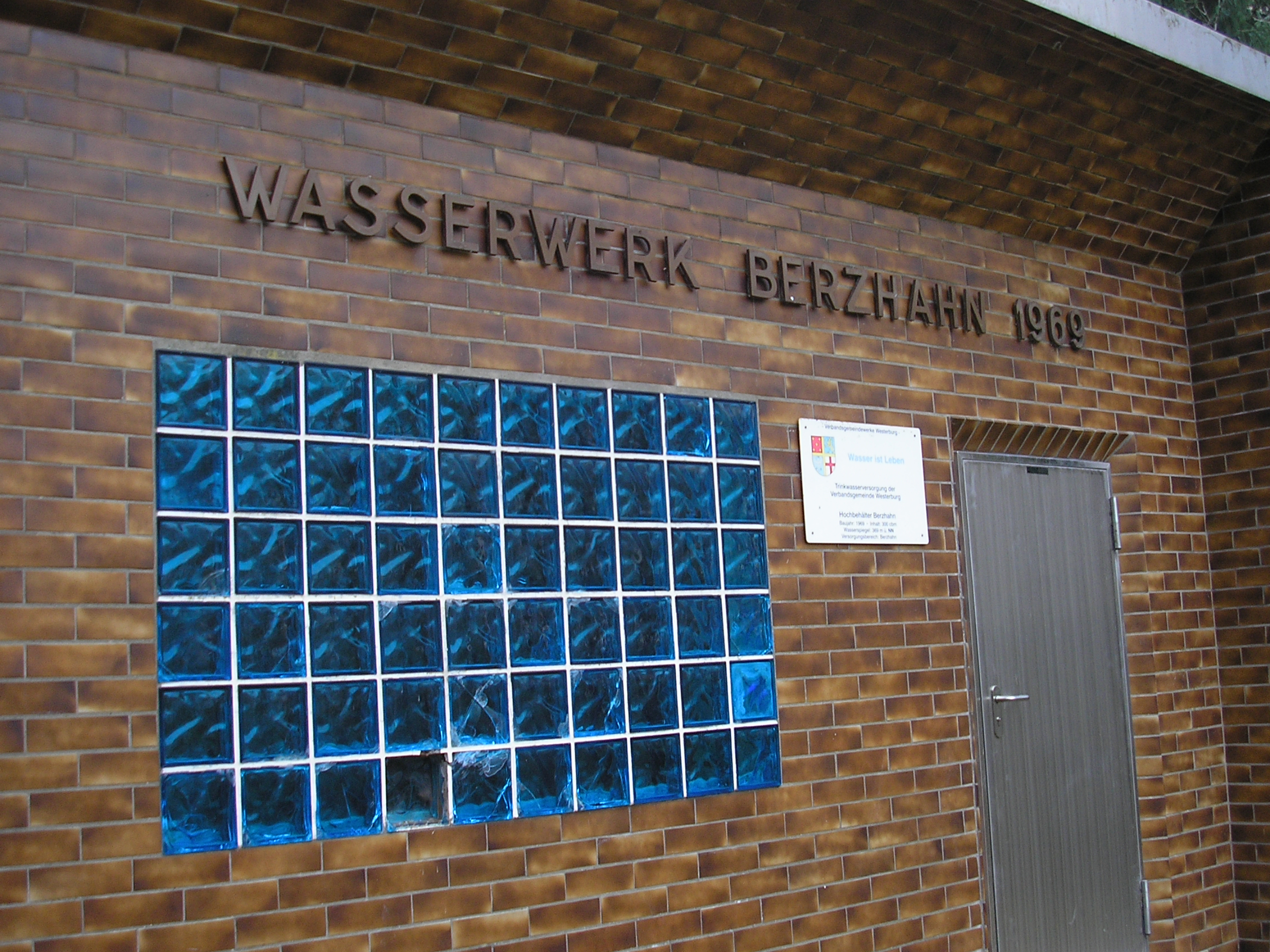 Wasserwerk Berzhahn, erbaut 1969, Westerwaldkreis